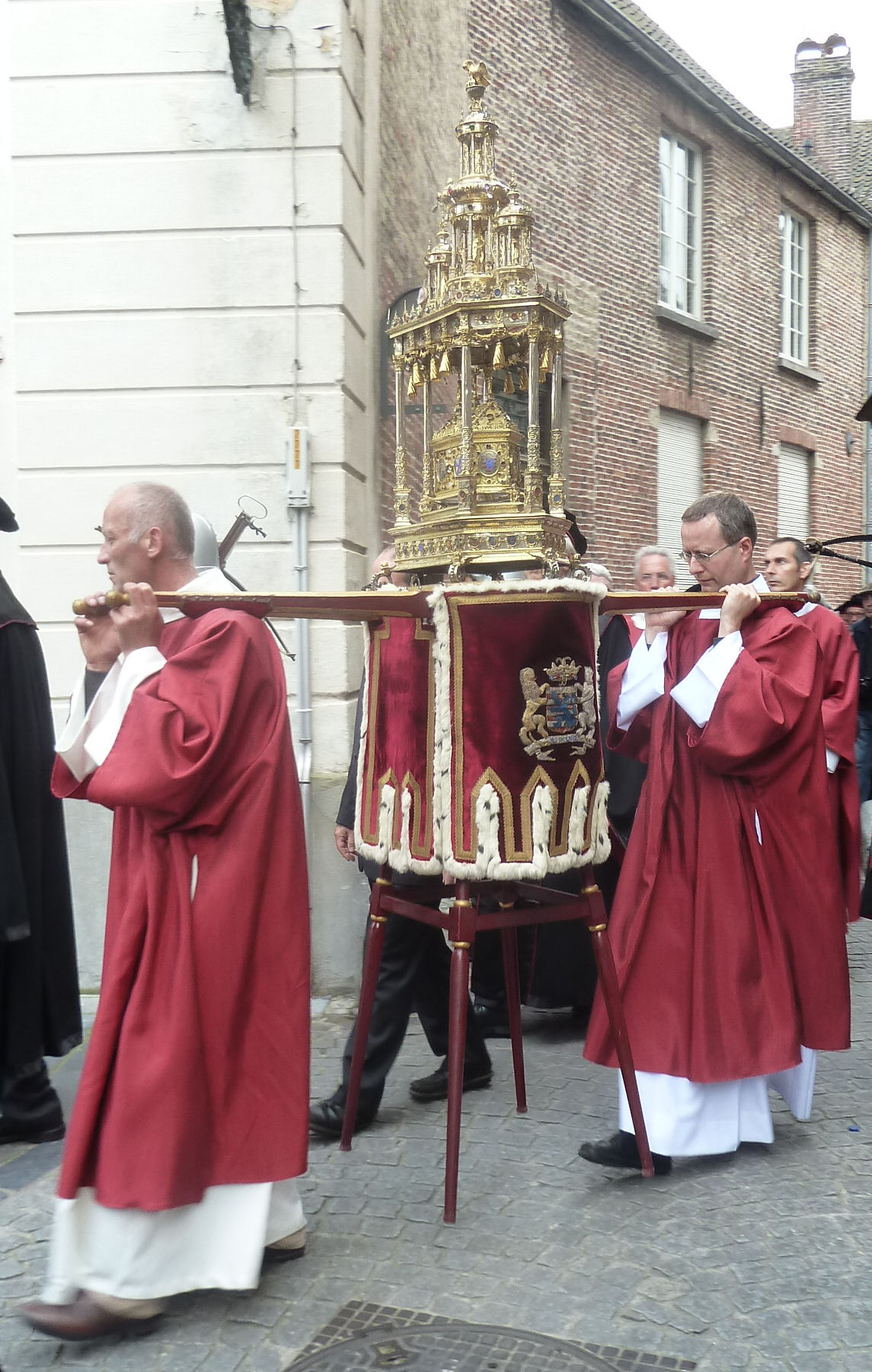 Bloedprocessie AD2014, Brugge